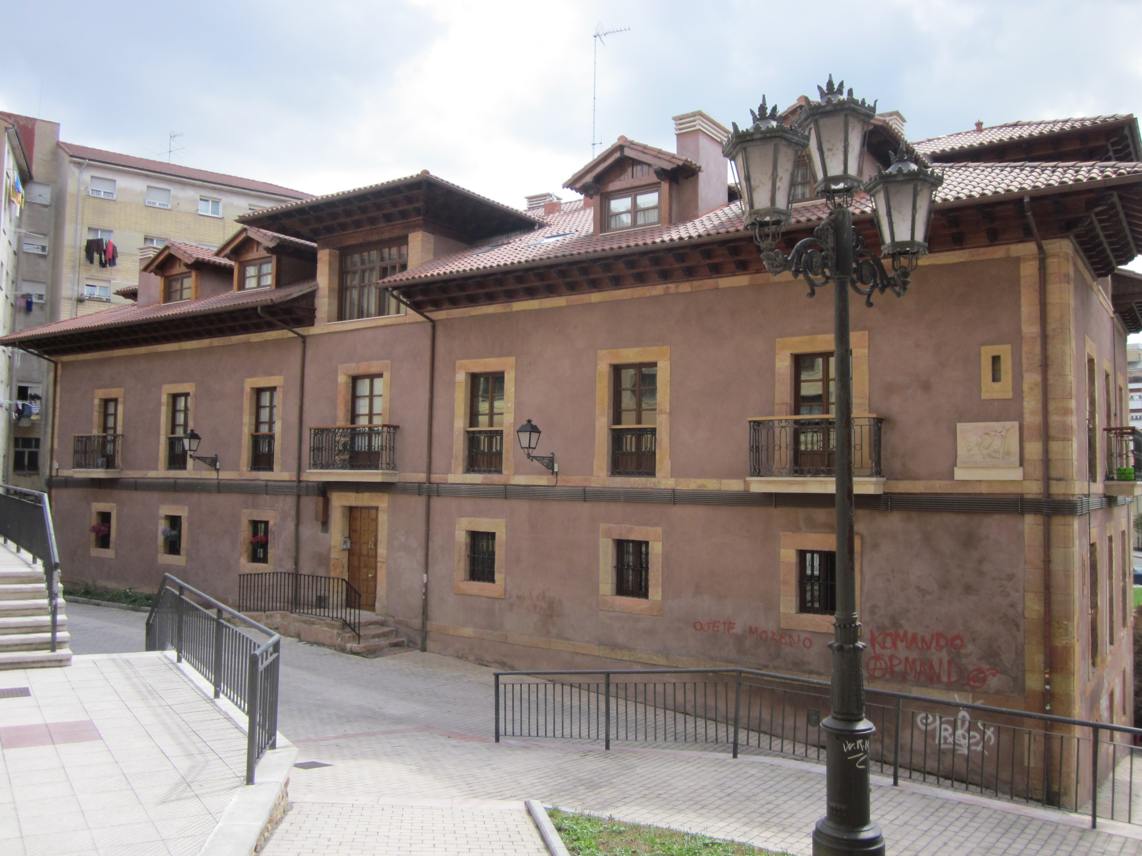 Casona de Regla. Oviedo. Principado de Asturias. España.